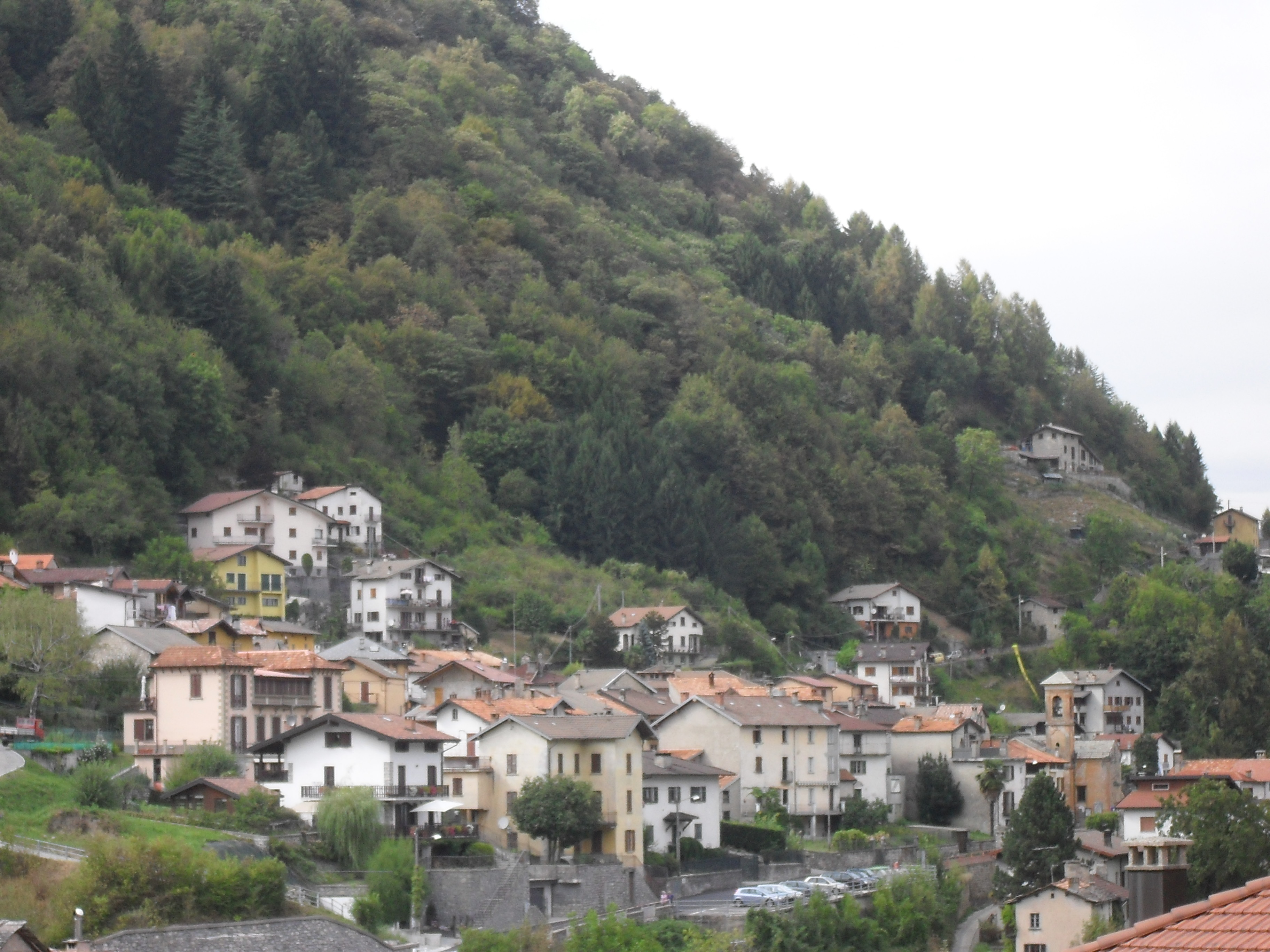 Frazione Auvrascio di Schignano